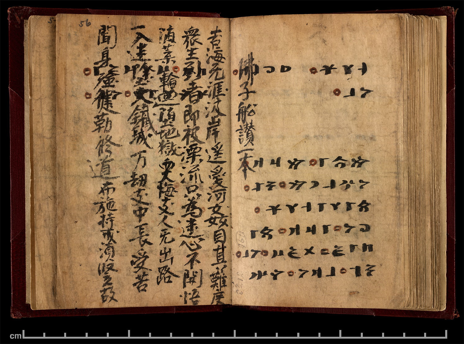 "Irk Bitig Fal Kitabı" page 56